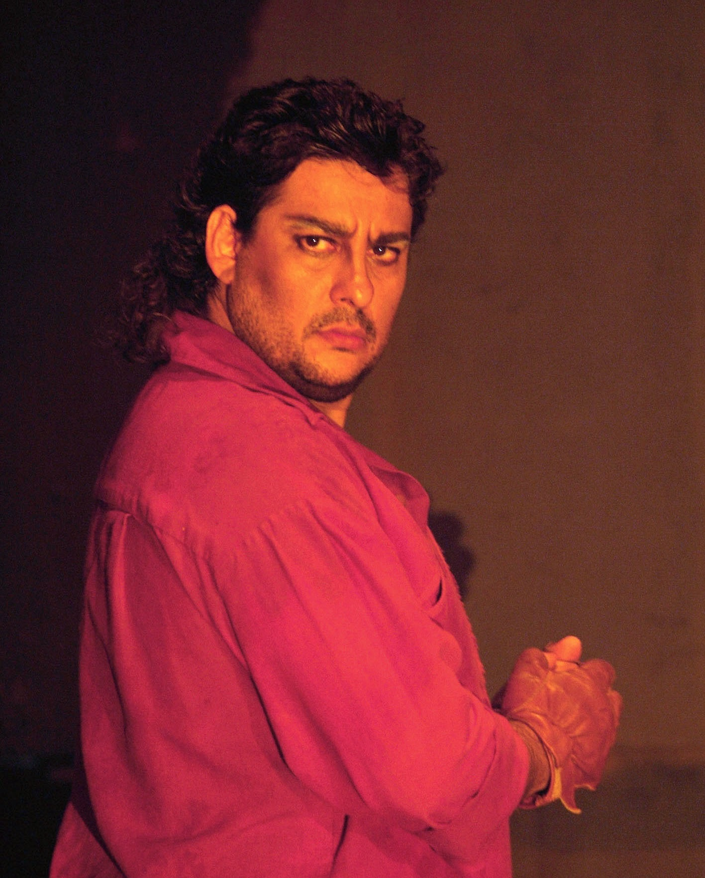 Дебют Марсело Альвареса в партии Манрико, Пармский Театр Реждо, Италия, апрель 2006 года.